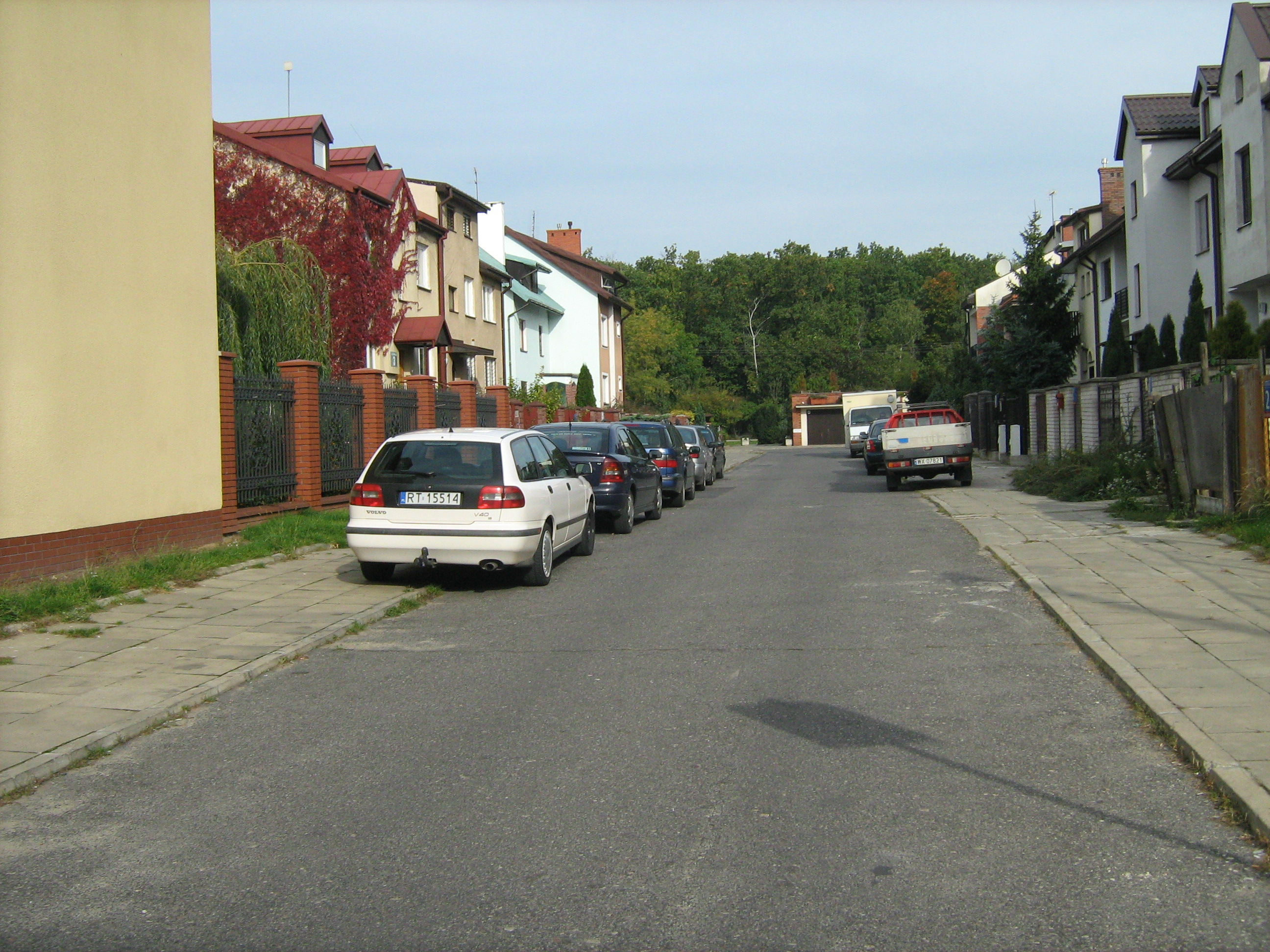 Schulza street in Warsaw (Poland) Ulica Brunona Schulza w Warszawie